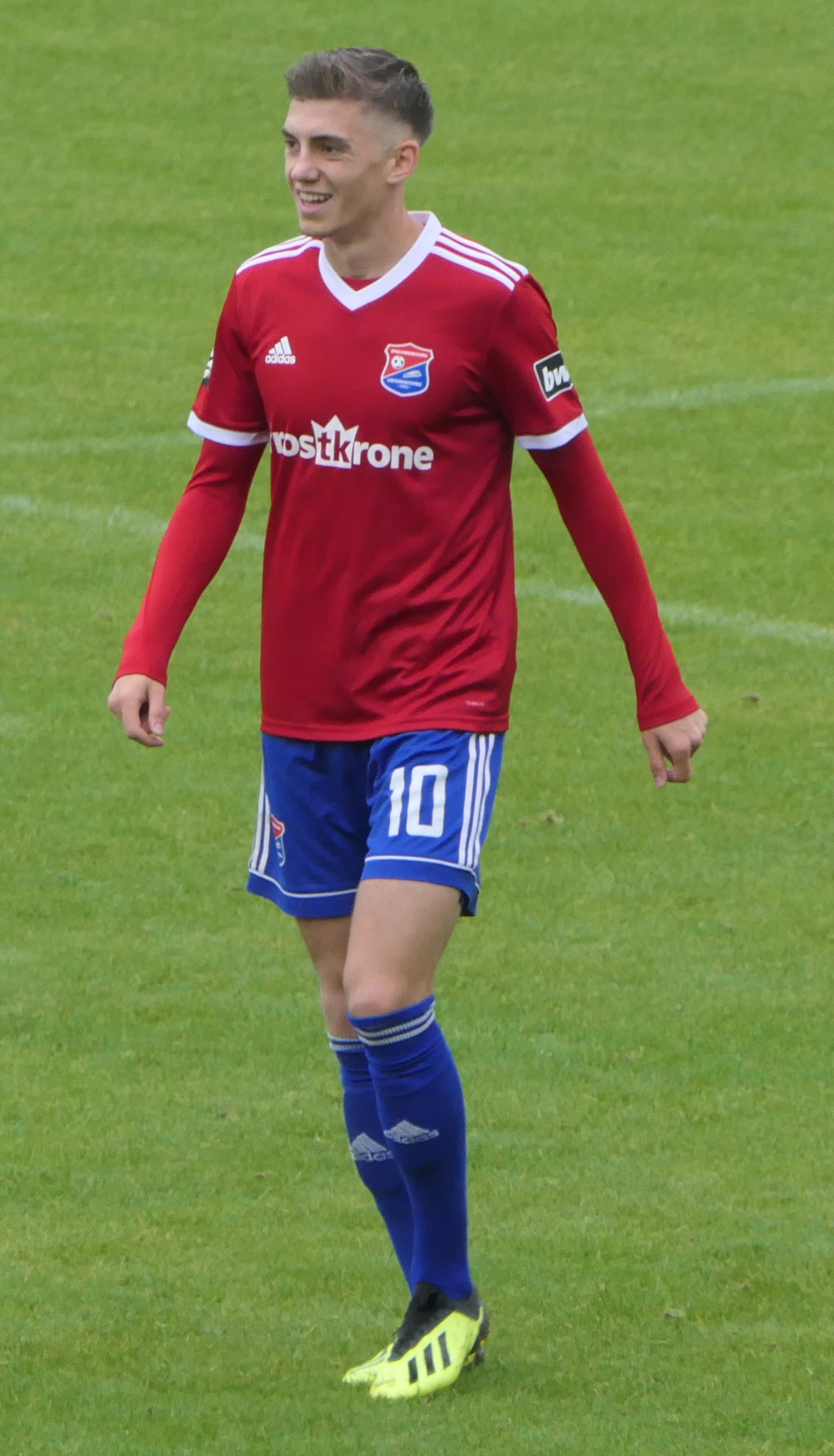 Der Fussballprofi Lucas Hufnagel im Trikot der SpVgg Unterhaching beim Heimspiel gegen Eintracht Braunschweig am 01.09.2018.